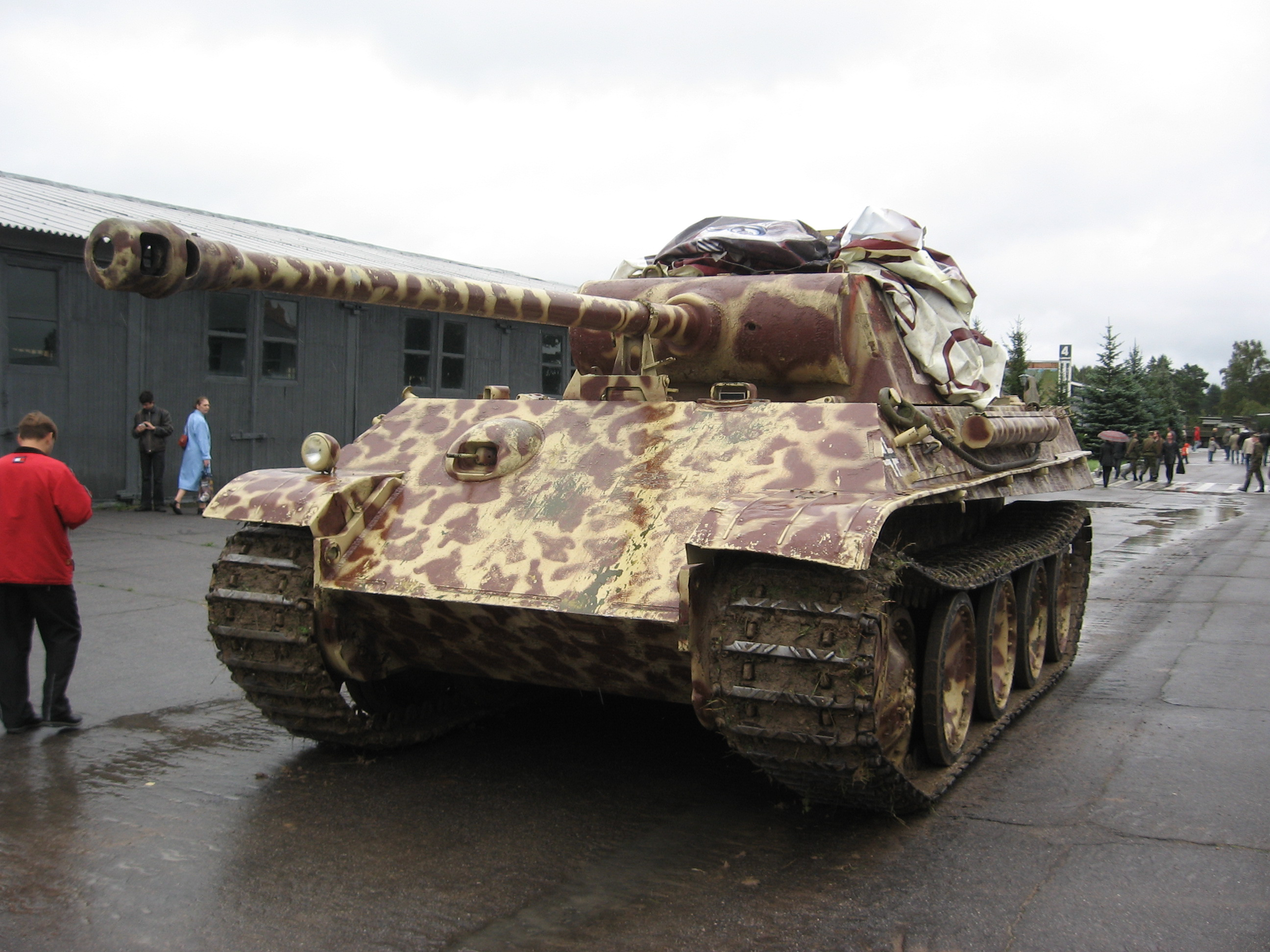 Пантера в музее БТТ, Кубинка